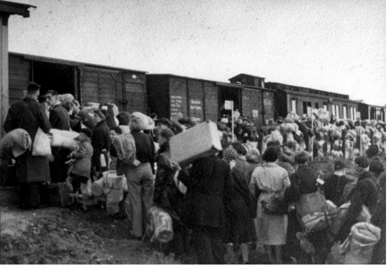 Mensen staan bepakt en bezakt te wachten bij de goederenwagons van een trein in doorvoerkamp Westerbork, 1942-1945. Datum: 1942